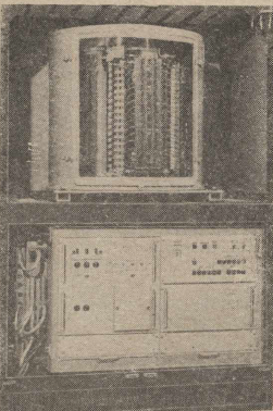 PB-7 pamięć bębnowa